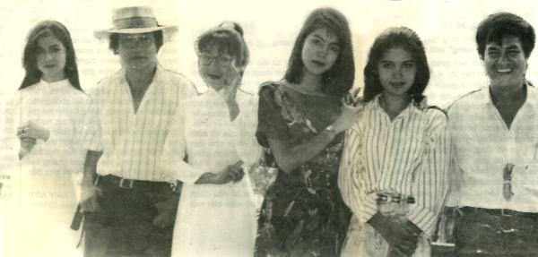 Đạo diễn Lê Hoàng Hoa, văn sĩ Nguyễn Đông Thức cùng bộ tứ nữ chính phim Vĩnh biệt mùa hè, 1992